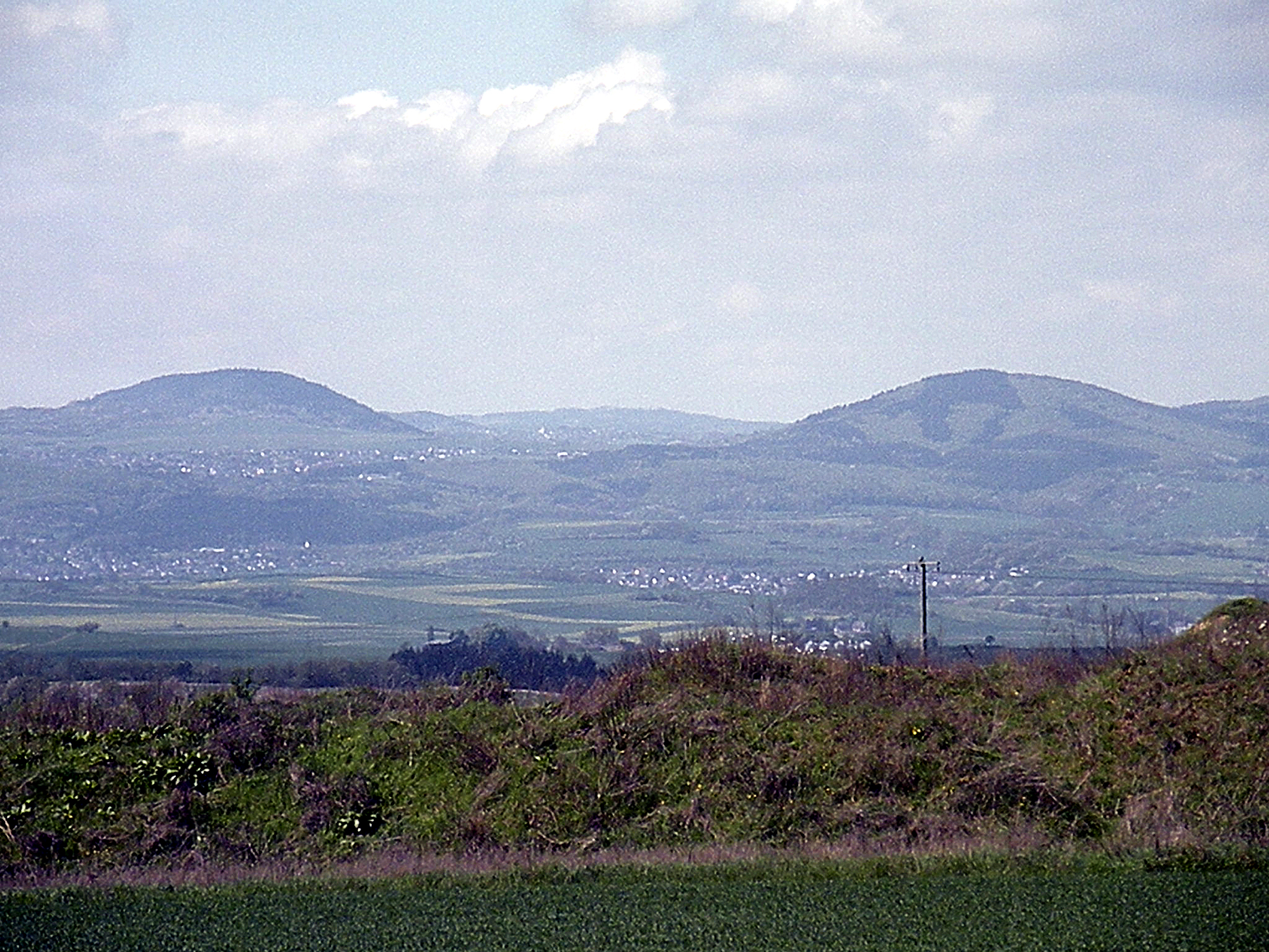 Вулканические купола Эйфеля.